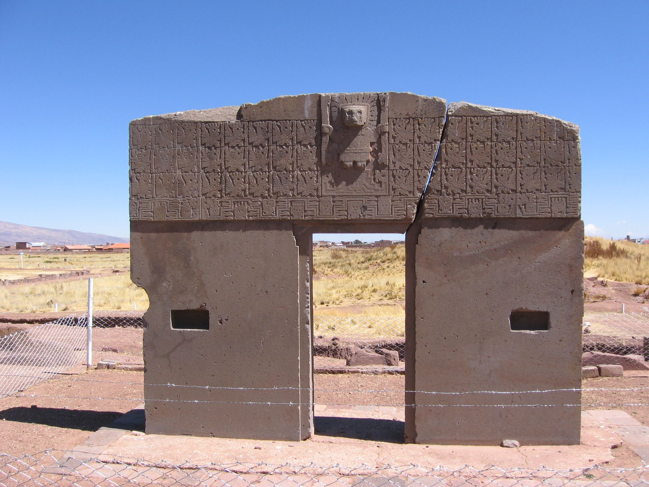 Sonnentor Tihuanaco